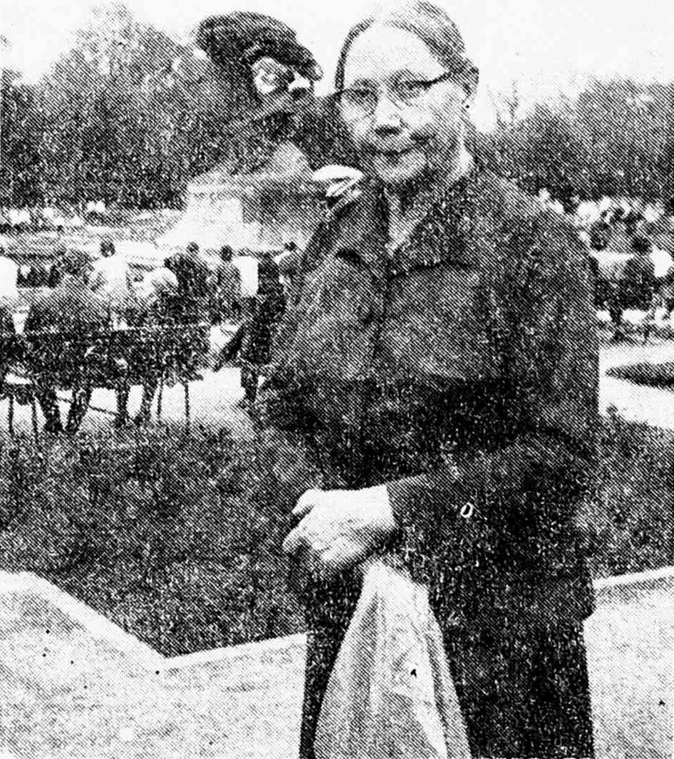 Finna esperantistino Irja Klemola antaŭ la monumento de Chopin en Varsovio